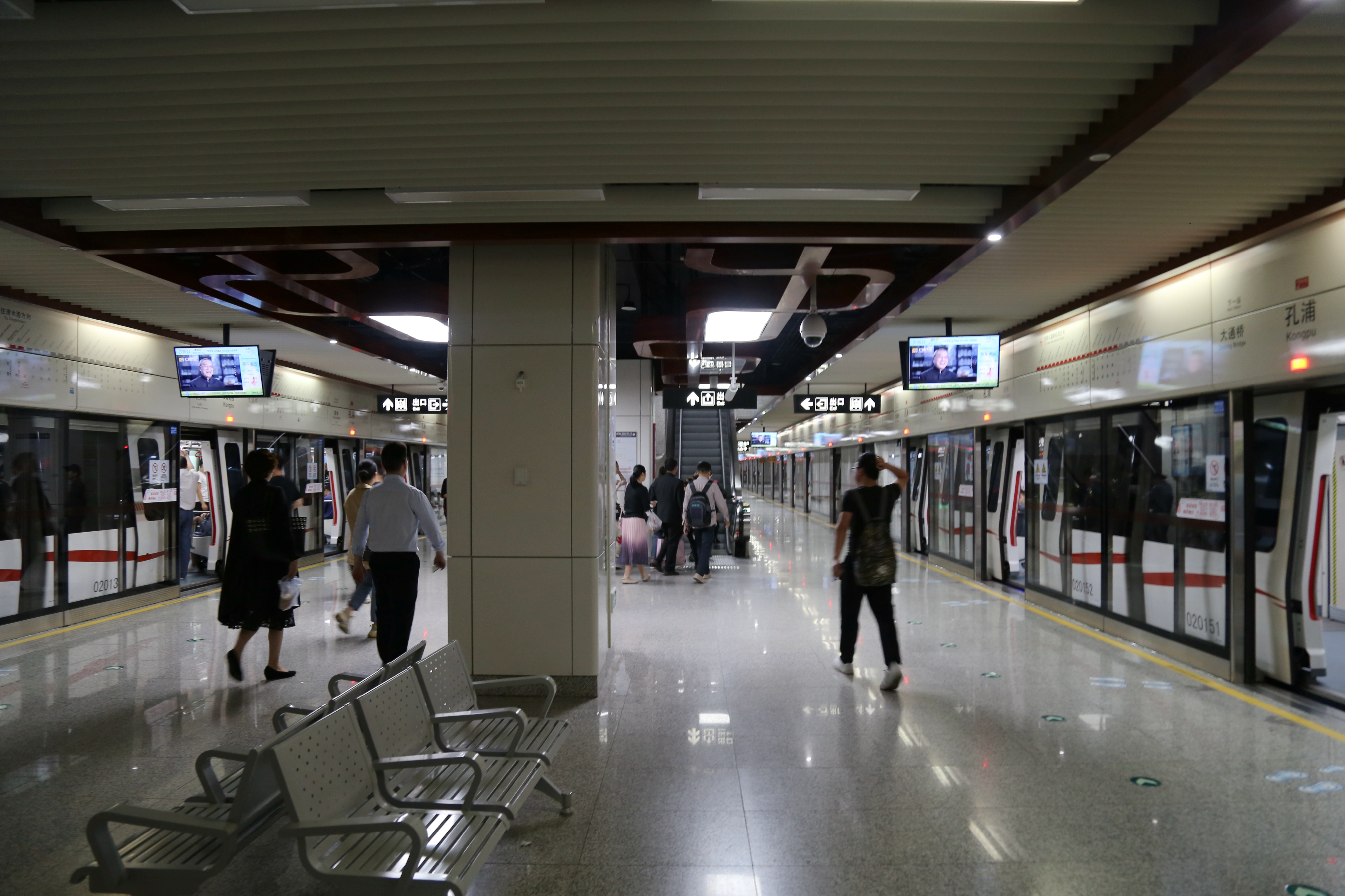 孔浦站站台